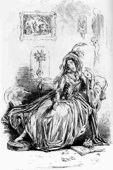 Dombey and Son, Estampe de Mrs Skewton, par Hablot Knight Browne et publiée séparément des parutions mensuelles.